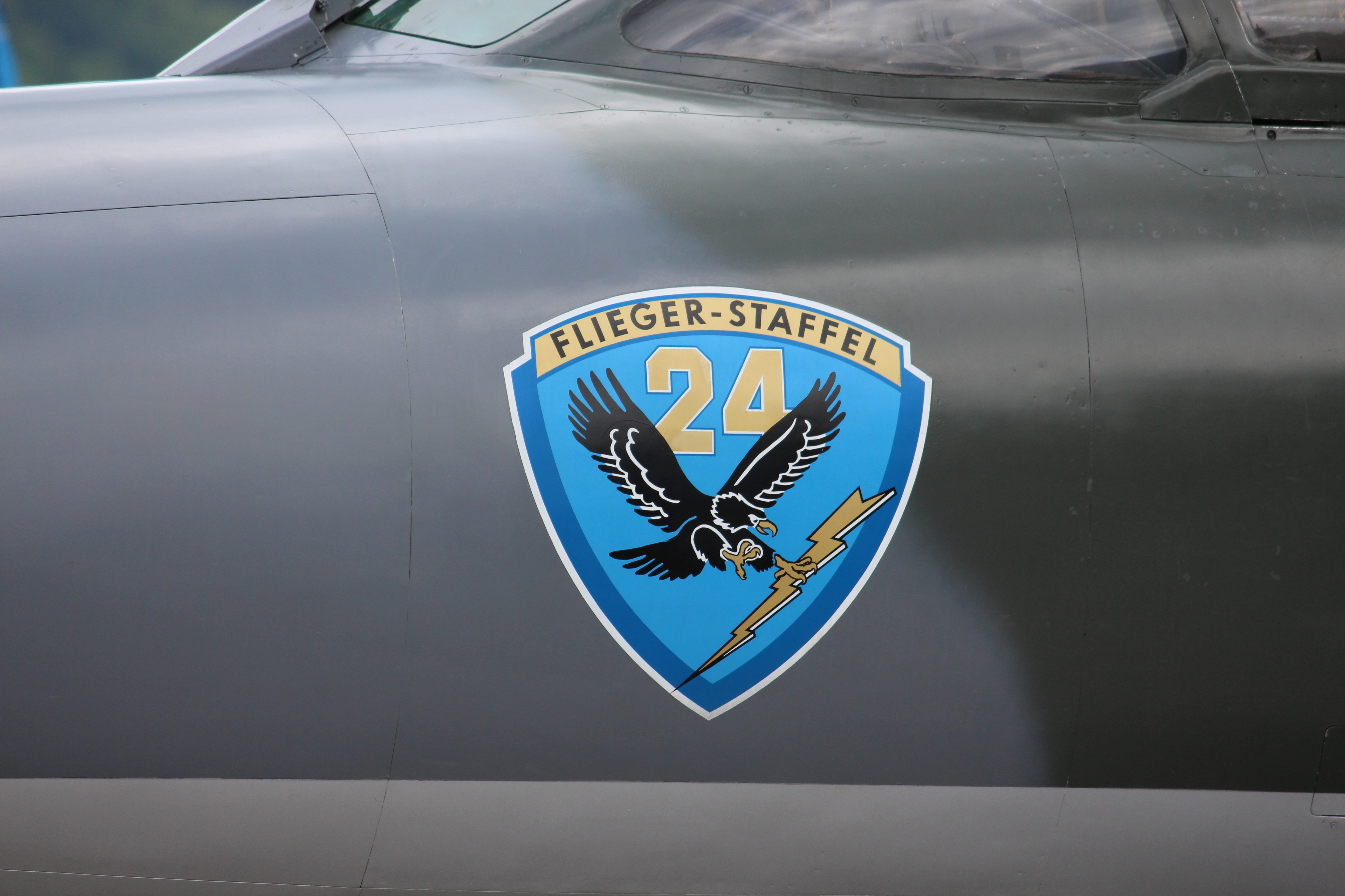 Ehemalige Hawker Hunter der Schweizer Luftwaffe am 75 Jahre Jubiläums des Militärflugplatz Alpnach